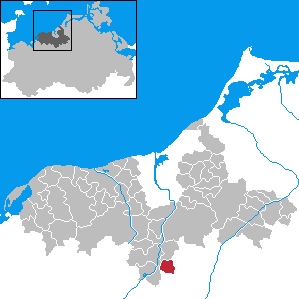 Rukieten in Mecklenburg-Western Pomerania - District Bad Doberan